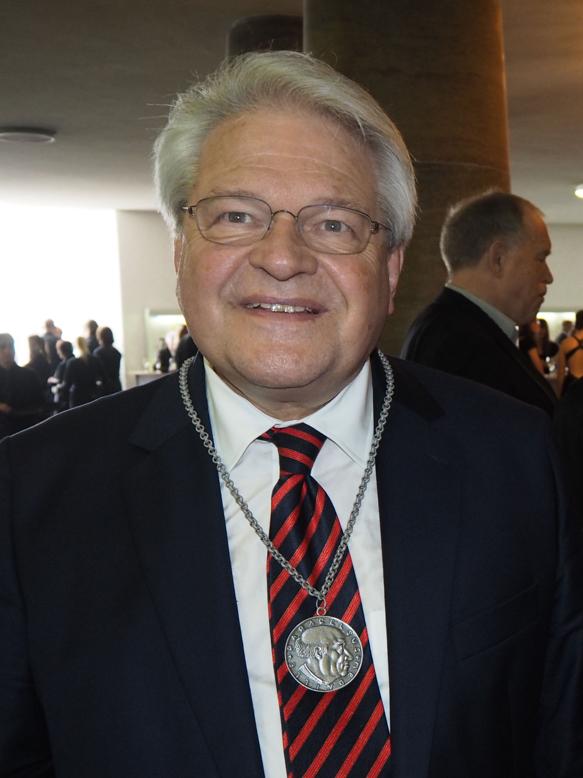 Dieter Mitrenga anlässlich der Verleihung der Paracelsus-Medaille auf dem 118. Deutschen Ärztetag in Frankfurt